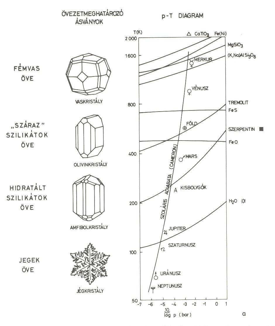 Ásványok kristályosodási sorozata a Naprendszerben a Lewis-Barshay modell alapján